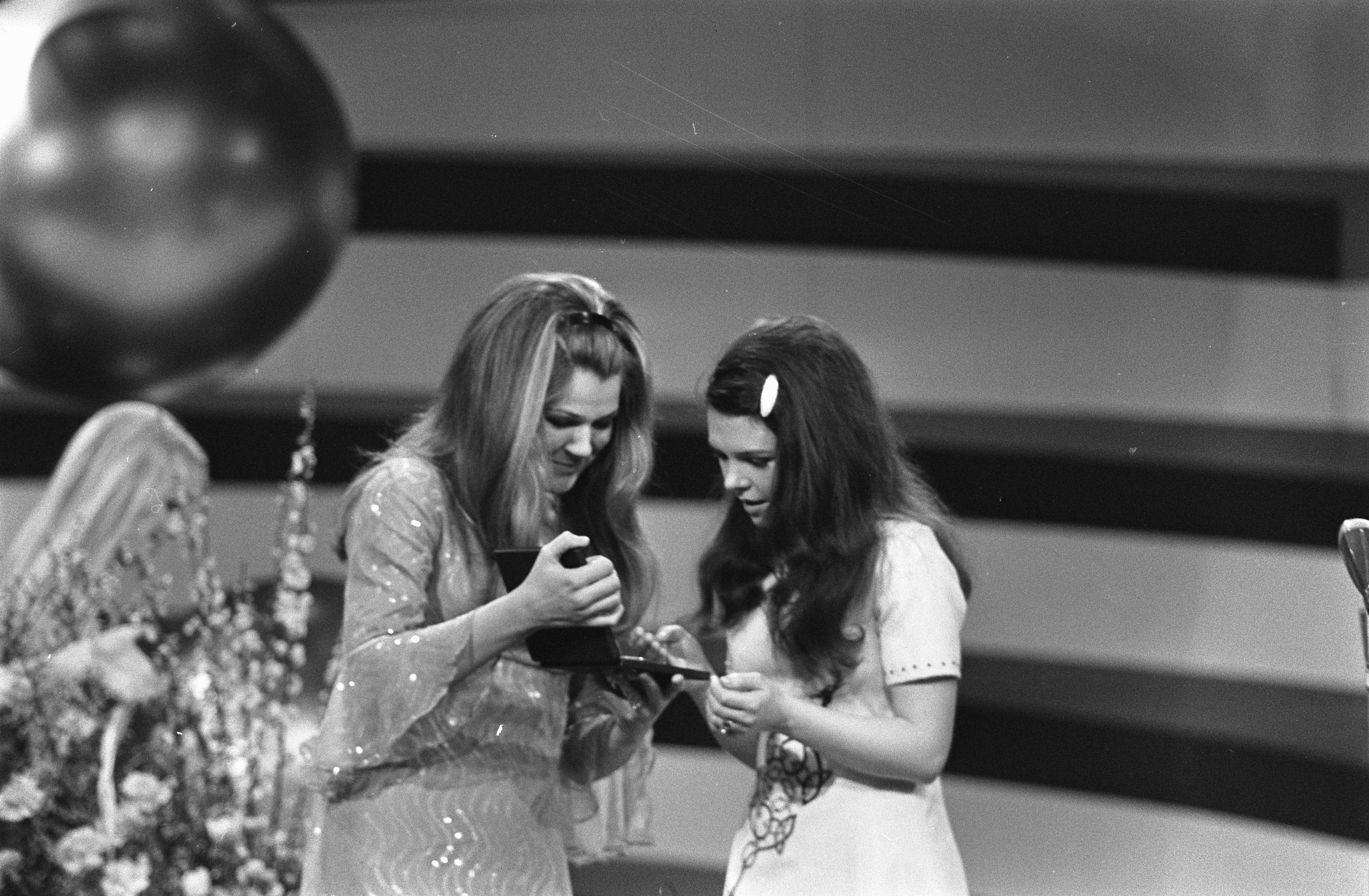 Collectie / Archief : Fotocollectie Anefo Reportage / Serie : Eurovisie Songfestival 1970 in RAI te Amsterdam Beschrijving : Lenny Kuhr (links) geeft winnares Dana de prijs Datum : 21 maart 1970 Locatie : Amsterdam, Noord-Holland Trefwoorden : artiesten, songfestivals, zangers Persoonsnaam : Dana, Kuhr, Lenny Instellingsnaam : Eurovisie Song Festival Fotograaf : Fotograaf Onbekend / Anefo Auteursrechthebbende : Nationaal Archief Materiaalsoort : Negatief (zwart/wit) Nummer archiefinventaris : bekijk toegang 2.24.01.05 Bestanddeelnummer : 923-3689